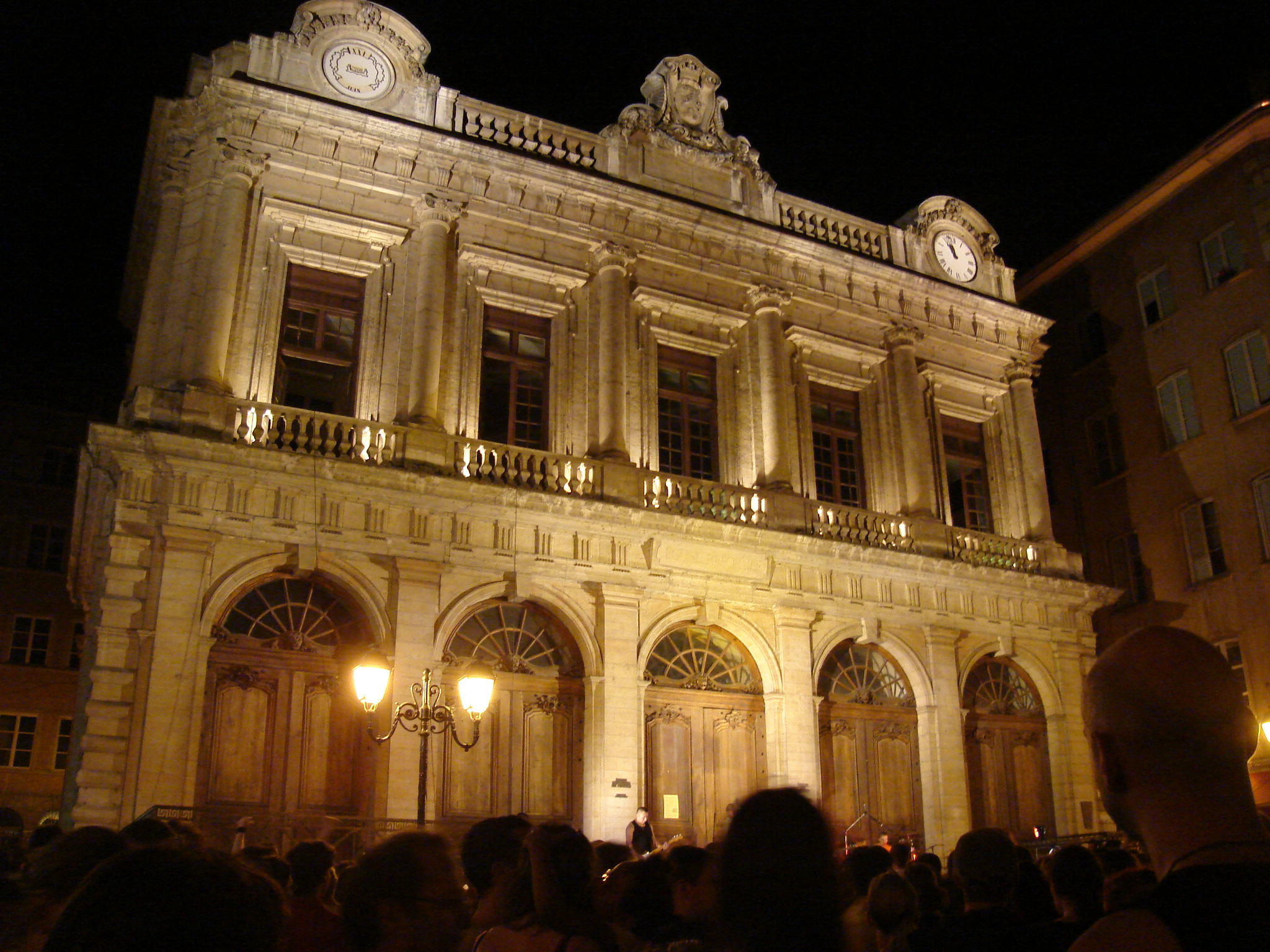 Le Temple du Change dans le Vieux-Lyon lors de la Fête de la Musique.